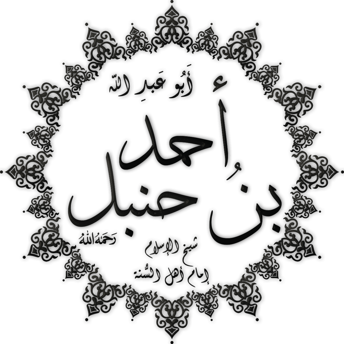 تخطيط لاسم الإمام أحمد بن حنبل بخط الثلث